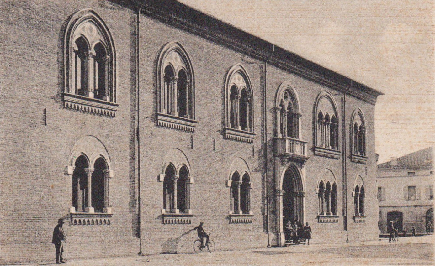 Mirandola - Scuole Ginnasiali